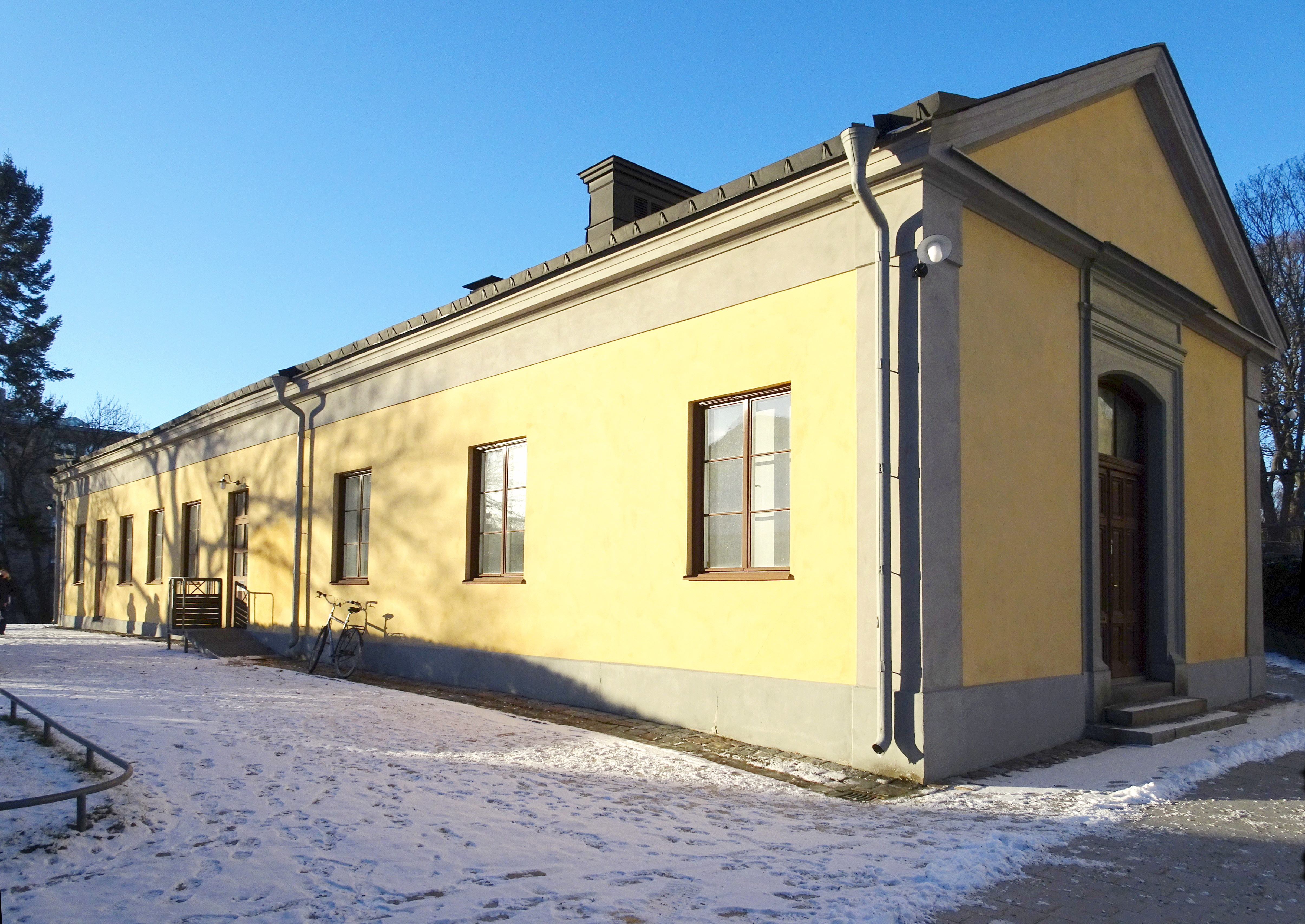 Fastigheten Grötlunken 3, Slöjdhuset, Sabbatsberg